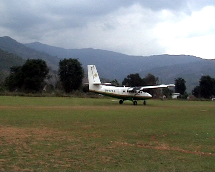 नेपाली: तुम्लिङटार